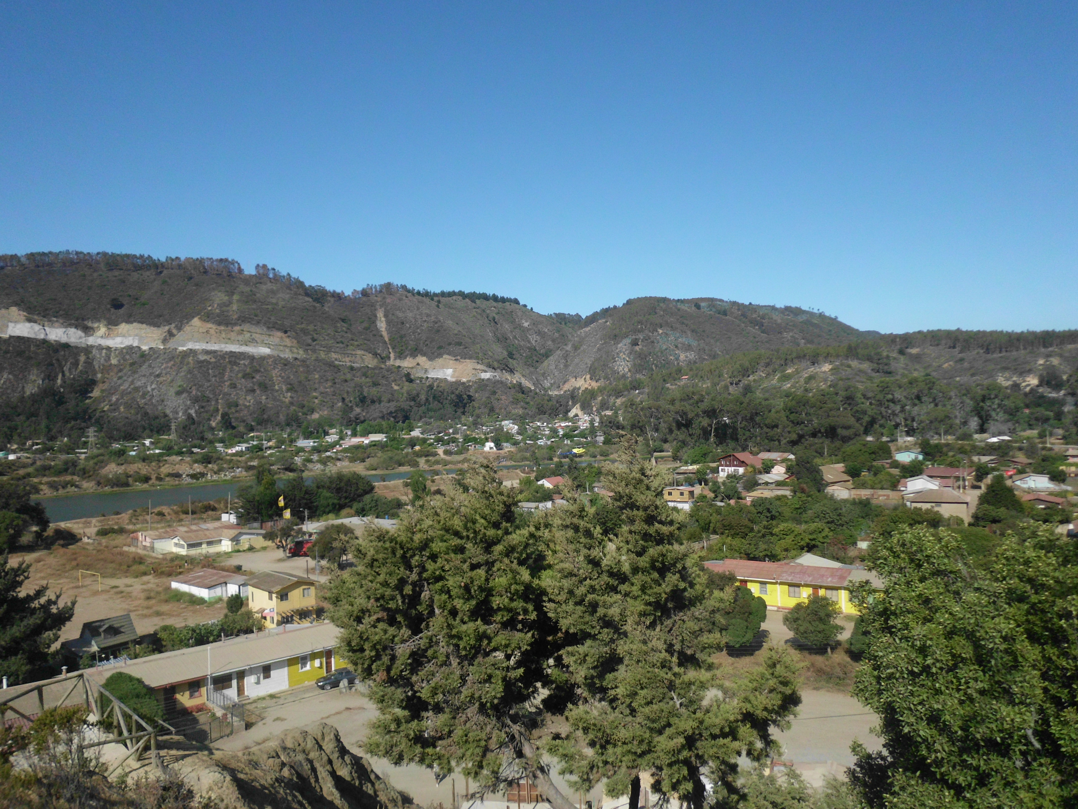 Vista sobre parte del humedal de Laguna Verde con el pueblo adyacente. Atrás en el cerro el camino hacia Valparaíso y al norte. This is a photo of a national monument in Chile: 1988